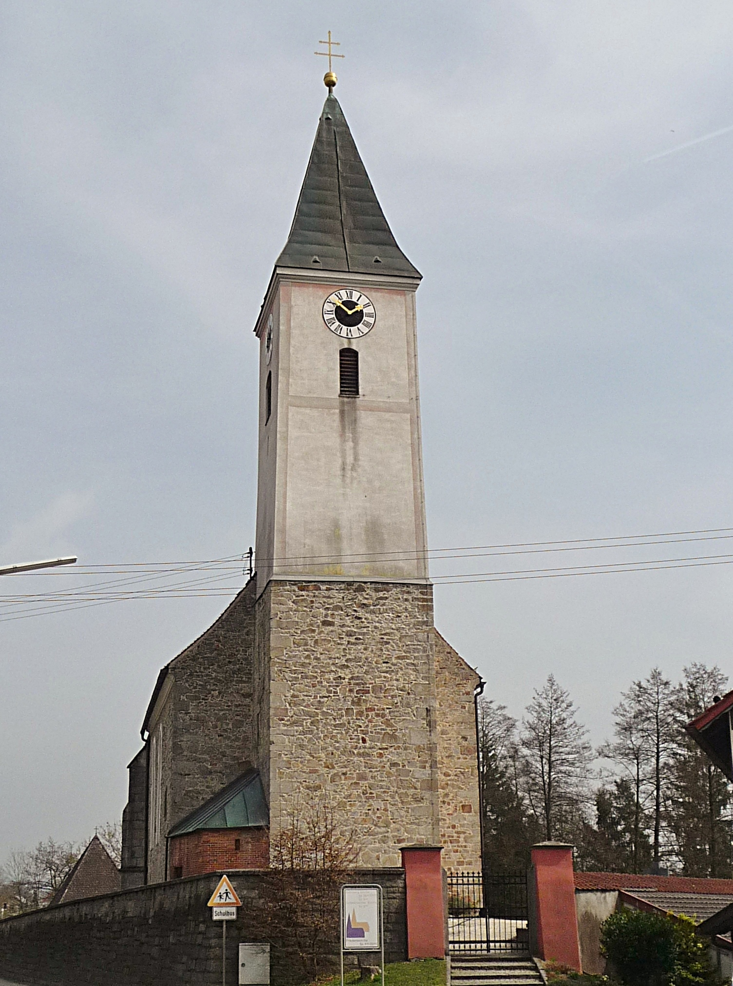 Die Nebenkirche St. Petrus in Schwarzach